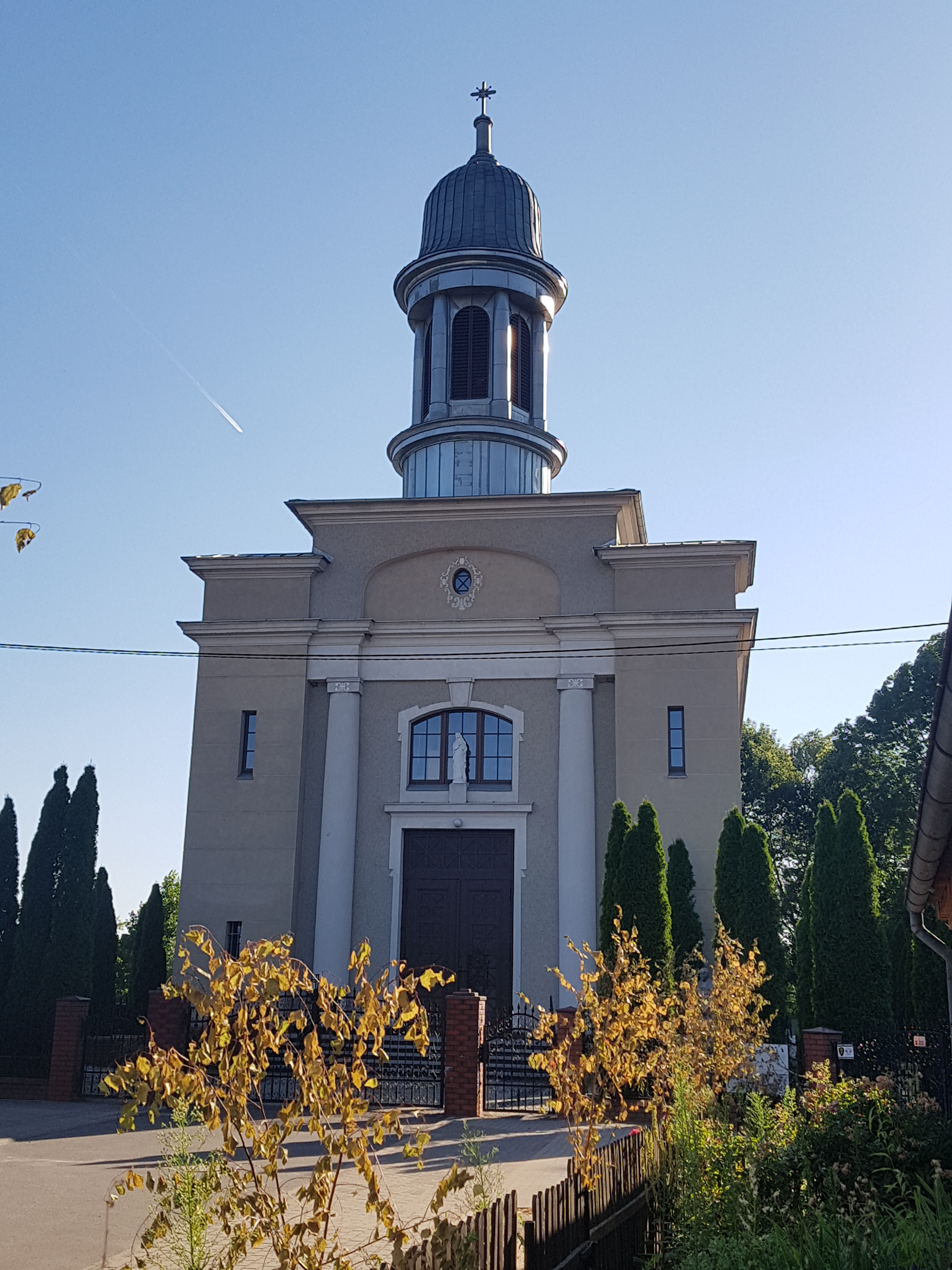 Kościół Rzymskokatolicki Pw. Wniebowzięcia Najświętszej Maryi Panny